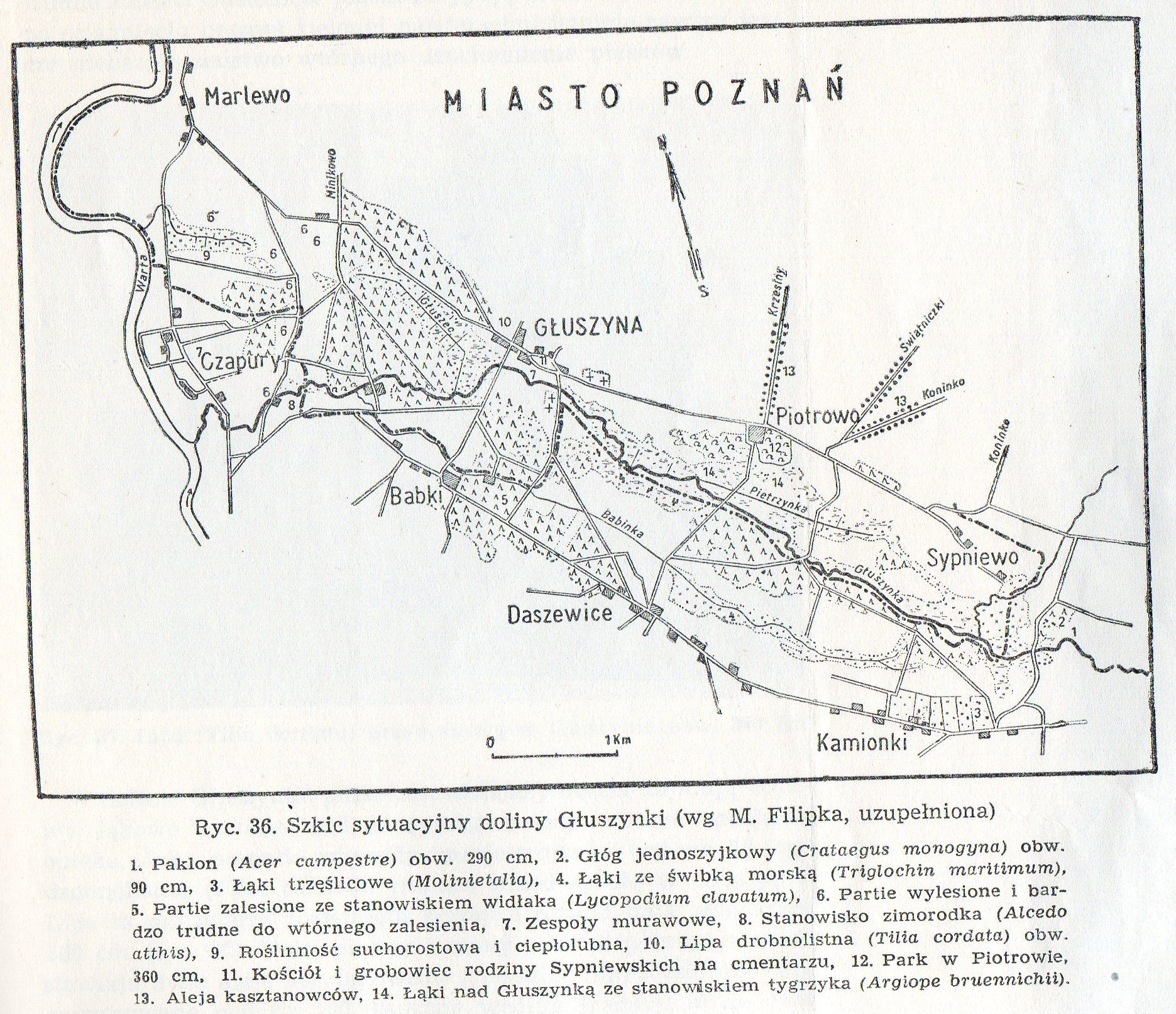 Dolina Kopla w Poznaniu.